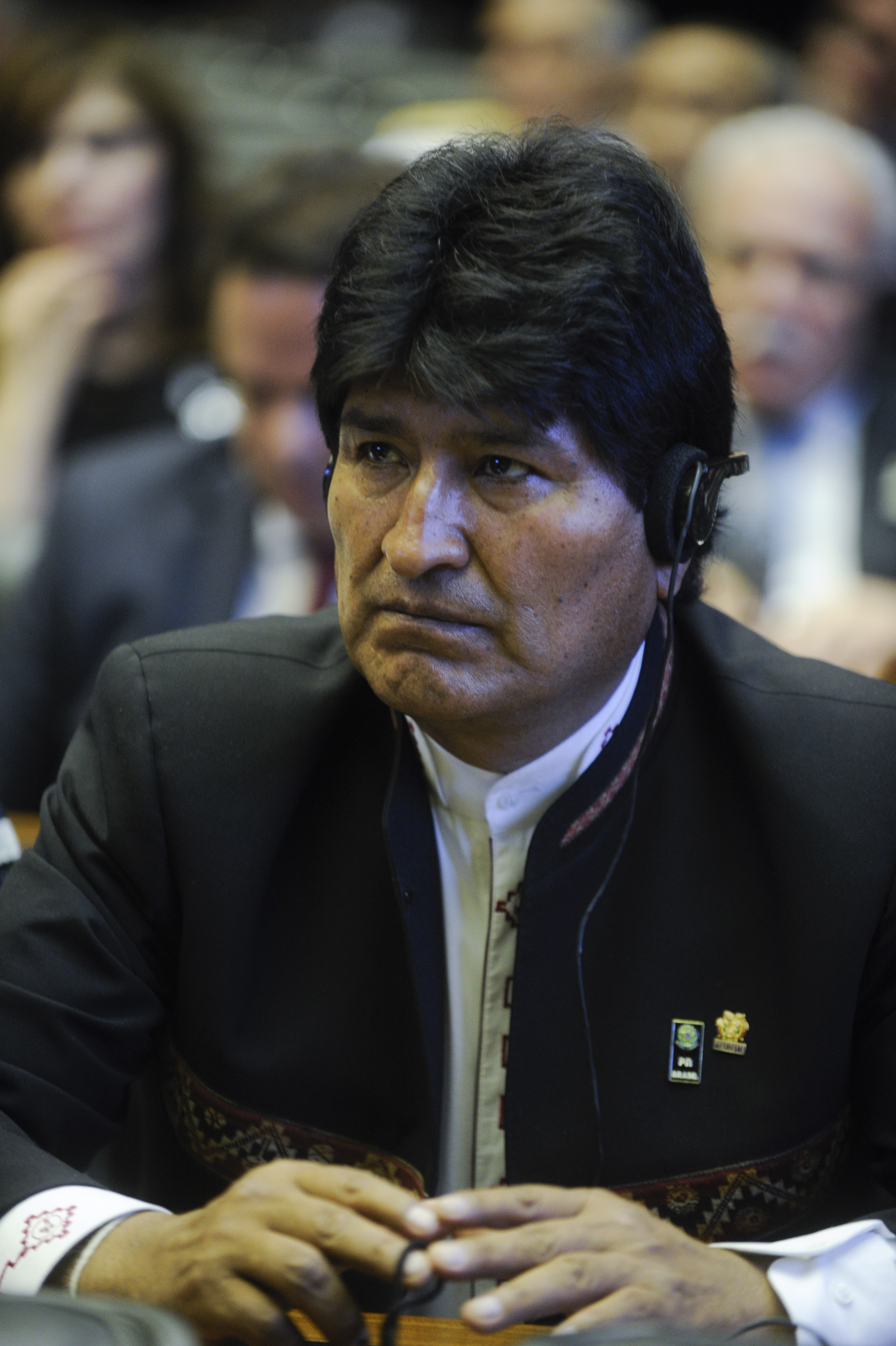 Plenário da Câmara dos Deputados durante solenidade de posse da presidente da República, Dilma Rousseff e vice-presidente Michel Temer. Chefes de Estado e autoridades internacionais participam do evento. Em destaque, o presidente da Bolívia, Evo Morales. Foto: Marcos Oliveira/Agência Senado